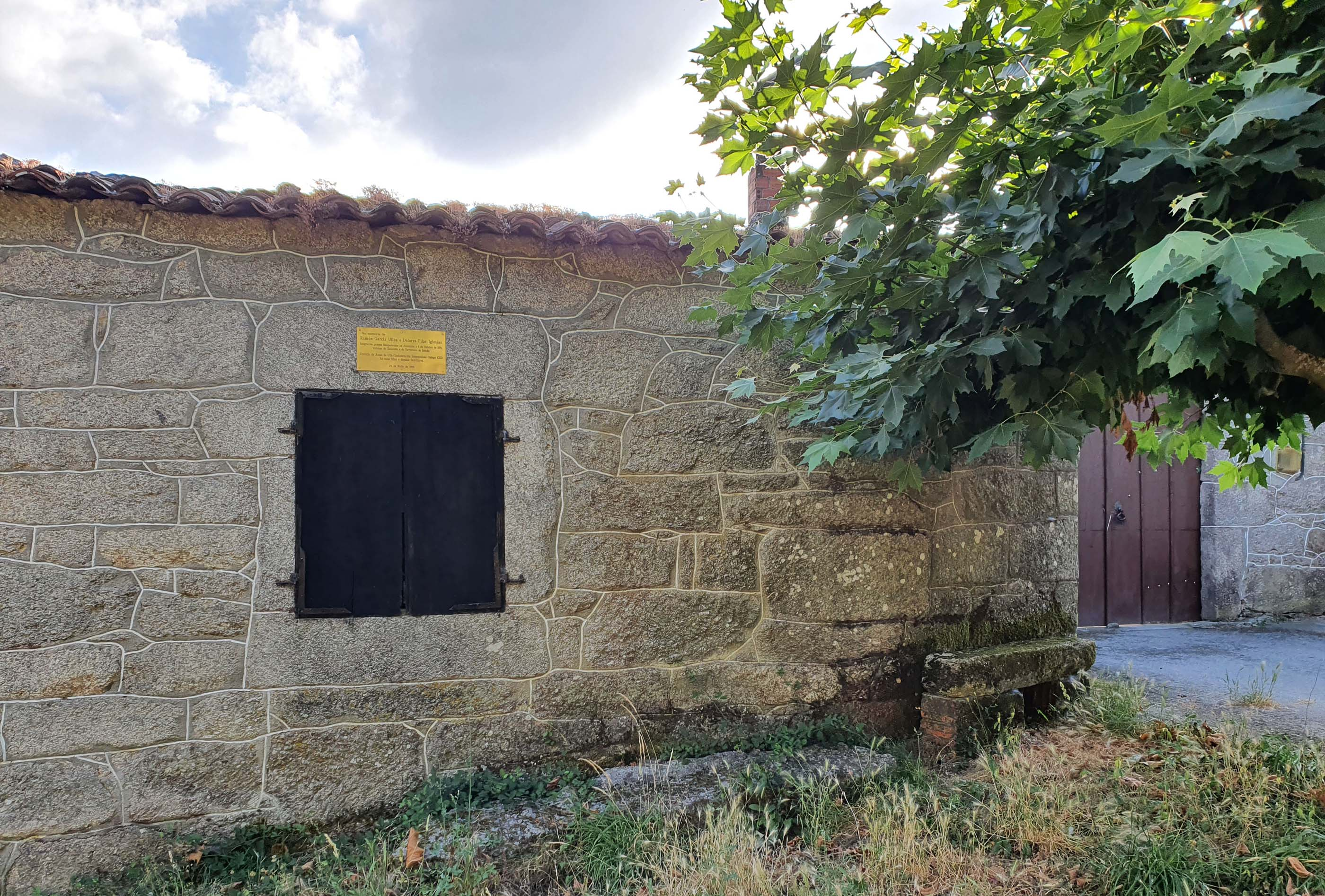 Lugar de Castrillón, na parroquia de Vilapoupre no Concello de Antas de Ulla. Situada máis ao norte, camiño de Portocarreiro e do Estanco. Nunha casa do lugar, coñecida co mesmo homónimo, hai unha placa datada o 24-7-1999 que di "Na memoria de Ramón García Ulloa e Dolores Pilar Iglesias. Emigrantes galegos desaparecidos na Arxentinao 6 de outubro de 1976, víctimas do Xenocidio e do Terrorismo de Estado. Concello de Antas de Ulla-Confederación Intersindical Galega(CIG). As súas fillas e demais familiares".